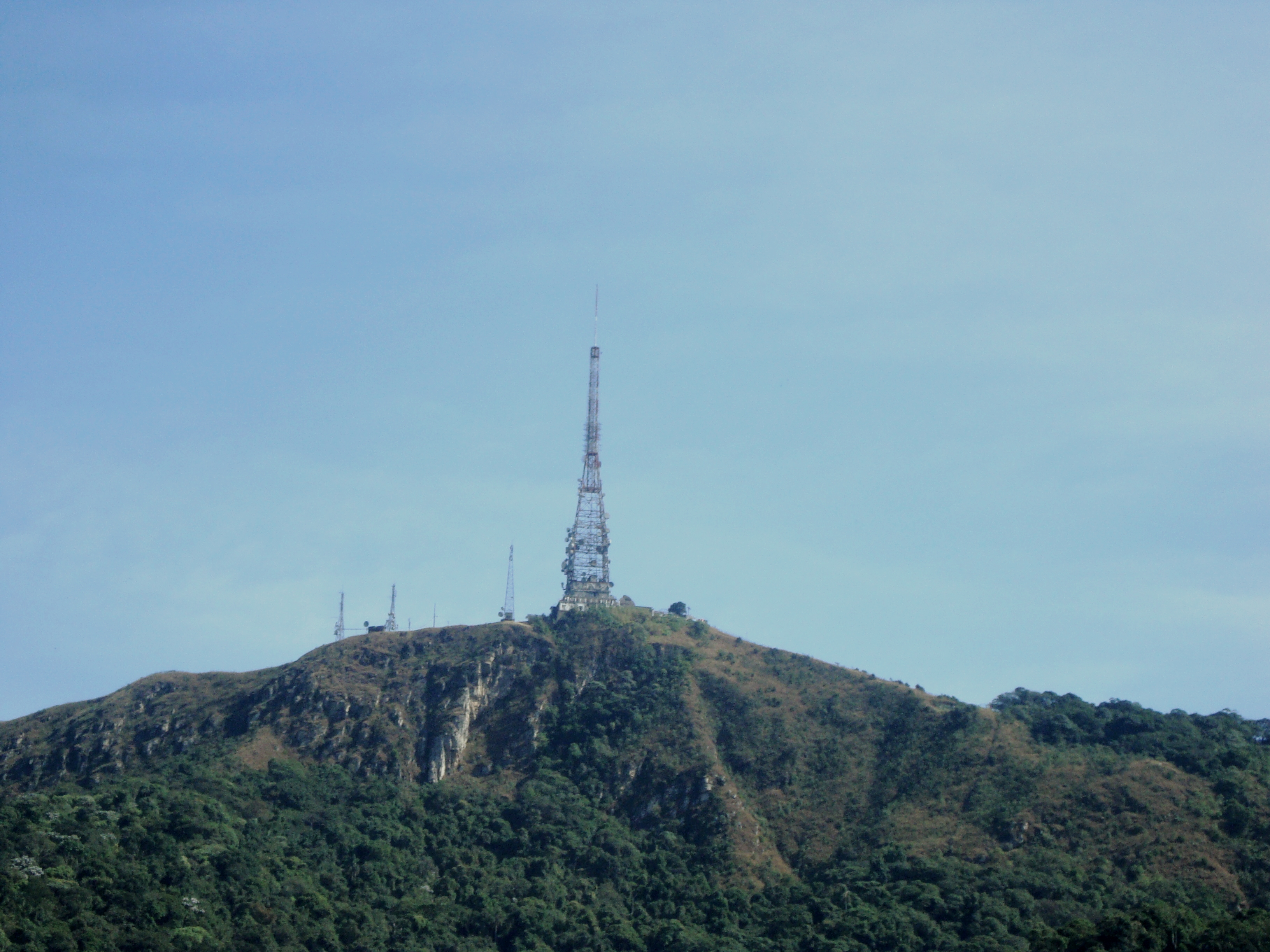 Torres do pico do jaraguá rod. bandeirantes